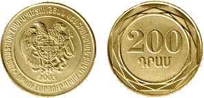 200 Dram (2003)